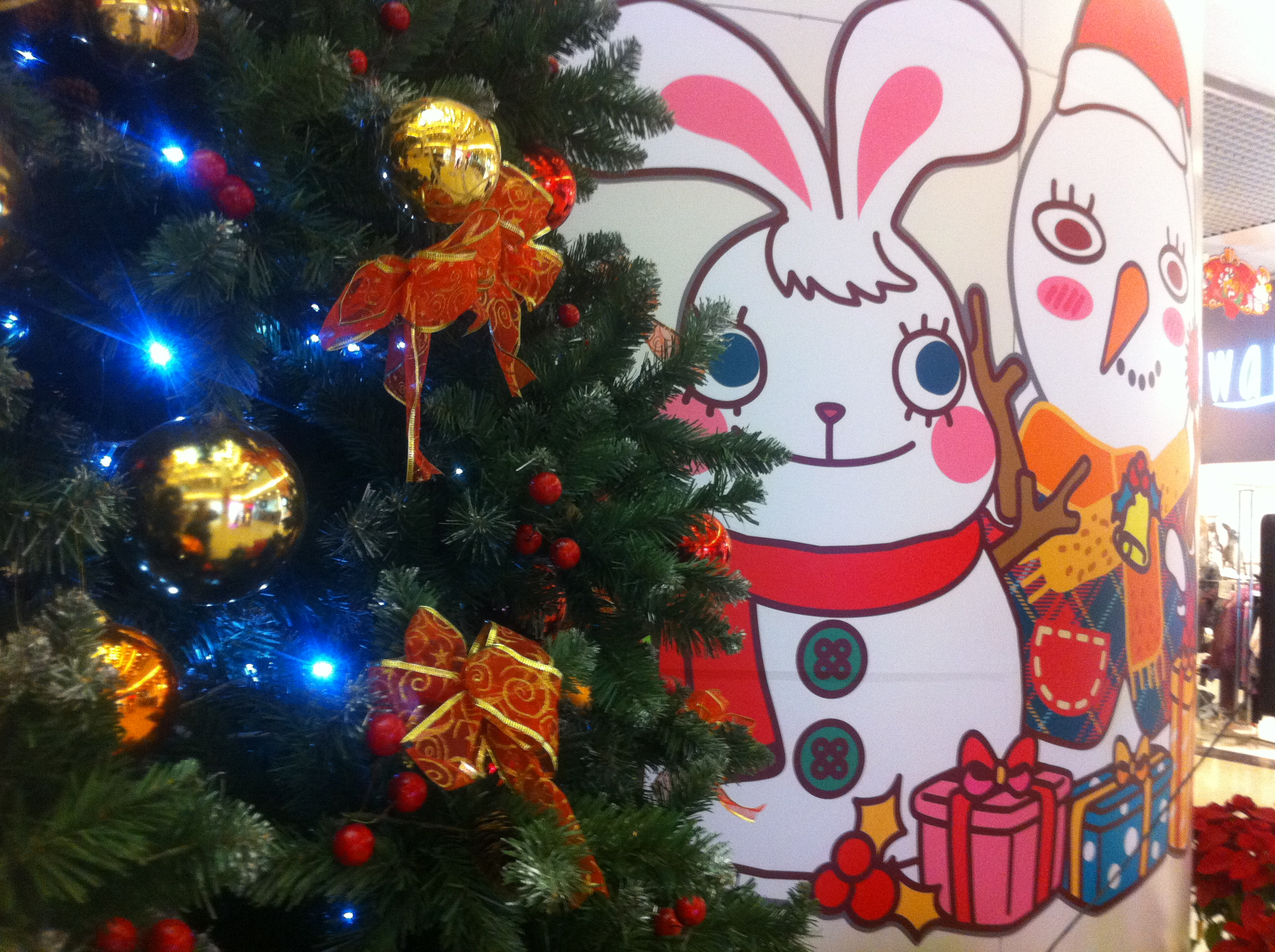 中文（香港）: 西寶城 2011年12月